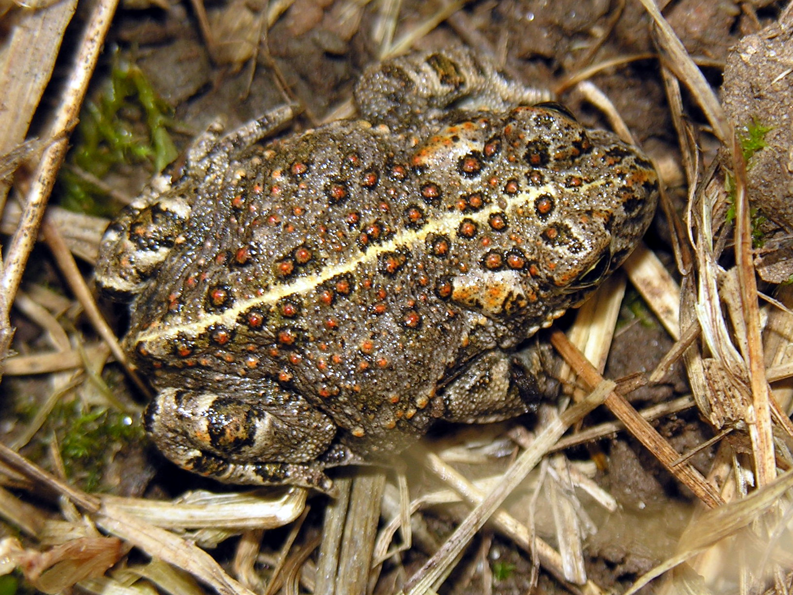 Bufo calamita, Fam. Bufonidae, juvenile specimen.